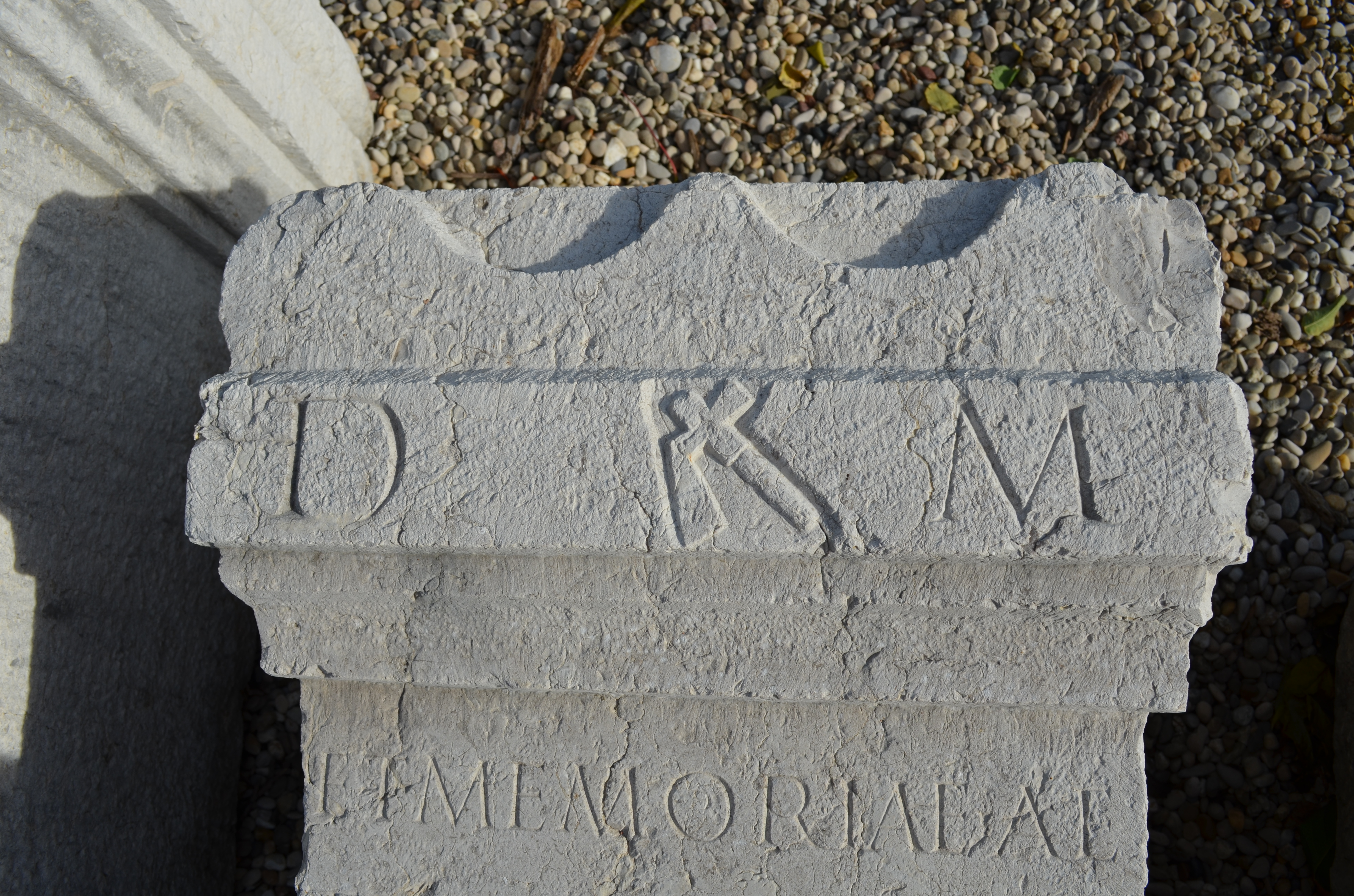 Musée gallo-romain de Fourvière (Lyon) - Jardin archéologique du théâtre antique de Lyon - Un cippe extrait du puits de Trion en 1886 : D(iis) M(anibus) / et memoriae ae/ternae / Q(uintus) Matiso(ni) Pollionis, Q(uintus) An/nius Ausonius Pris/cus nepos av(un)/culo pientissimo / et Helvia Gaetica / coniux digno, / posuerount et sub ascia dedicaverunt : Aux dieux Mânes et à la mémoire éternelle de Quintus Matisonius Pollio ; Quintus Annius Ausonius Priscus son neveu, à son excellent oncle, et Helvia Gaetica sa femme à son digne époux, ont élevé (ce tombeau) et l'ont dédié sous l'ascia.